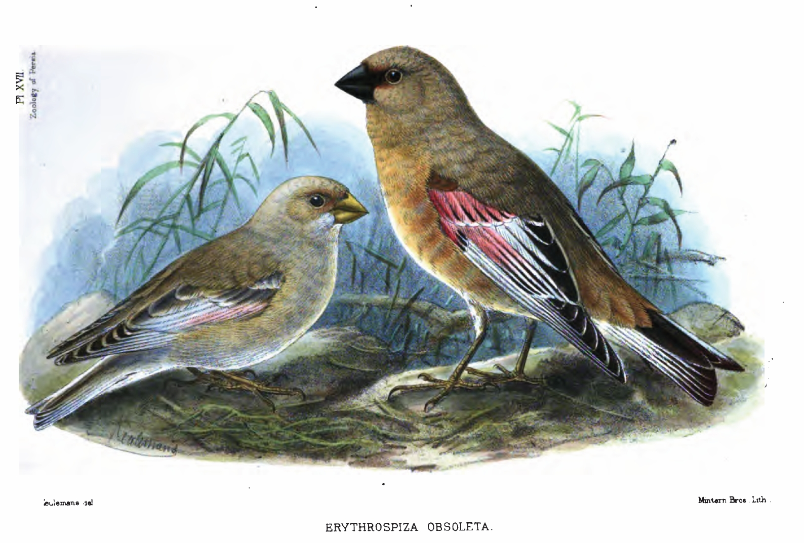 Desert Finch Rhodopechys obsoleta Syn. Rhodospiza obsoleta Syn. Carduelis obsoleta